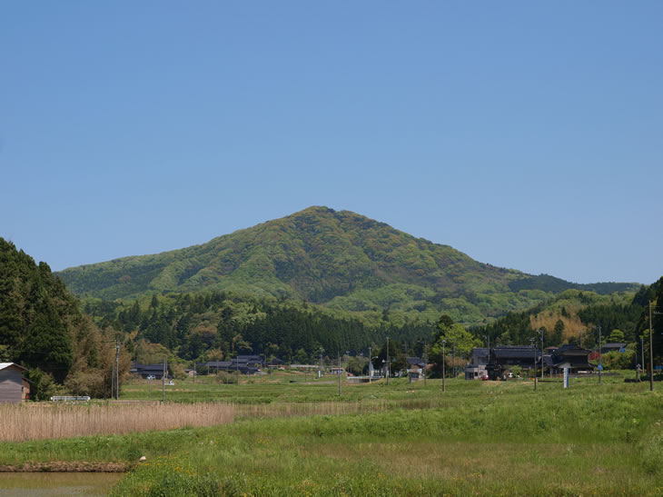 石川県、能登の高爪山（能登富士）